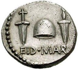 La bildo estas kopiita de nl. La originala priskribo estas: Beroemde munt van Brutus met op de voorzijde zijn eigen portret; op de keerzijde de symbolen van de moord op Gaius Iulius Caesar: Vrijheidsmuts (Latijn: pileus, symbool van de Dioscuri, de bevrijders van Rome en de muts die symbolisch aan slaven werd gegeven bij het verkrijgen van hun vrijheid), twee verschillende dolken, en EID MAR (afkorting voor "EIDibus MARtii") 15 maart, de datum waarop Gaius Iulius Caesar werd vermoord. Cassius Dio (Geschiedenis van Rome XLVII 25.3.) maakt melding van deze munt: "Brutus liet op de munten zijn eigen beeltenis slaan en een muts en de twee dolken en met het opschrift aangevend dat hij en Cassius het vaderland hadden bevrijd". Het is een zilveren denarius (afgebeeld exemplaar: 3.6 gr) geslagen in Noord Griekenland door een met Brutus meereizende muntenaar. Het opschrift op de voorzijde is L. PLAET. CEST BRVT IMP (L. Plaetorius Cestianus (magistraat) Brutus Imperator). Door zijn zeldzaamheid en zijn bijzondere historische betekenis is dit één van de beroemdste en meest waardevolle munten aller tijden (de waarde van het afgebeelde exemplaar wordt geschat op zo'n $40.000,00 (in mei 2004)). Bron: Classical Numismatic Group, Inc. (CNG) Categorie:Afbeelding oudheid Categorie:Afbeelding persoon